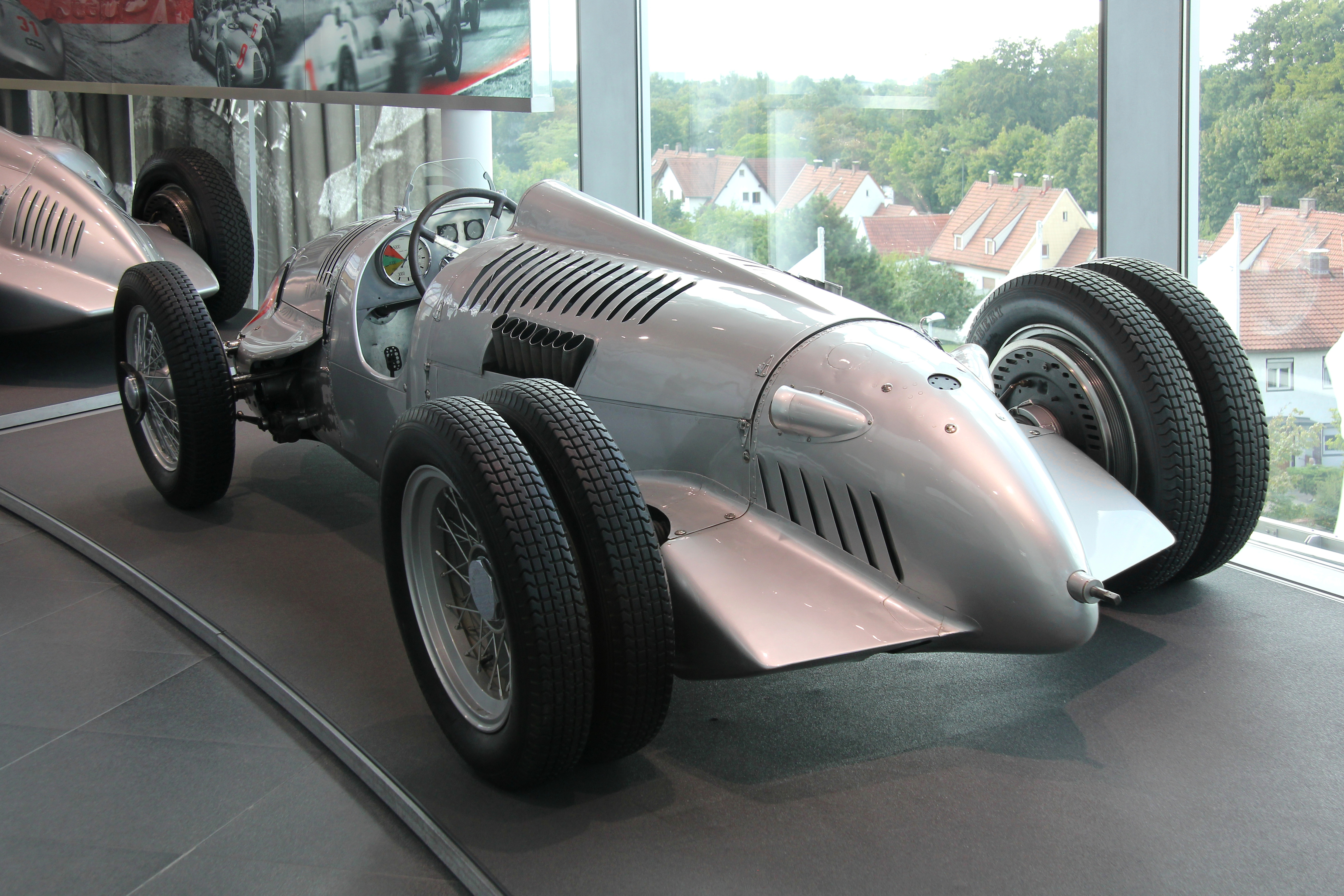 Auto-Union-Bergrennwagen mit dem Fahrgestell des Typs D von 1939 und dem 16-Zylinder-Motor des Typs C mit 6 Liter Hubraum und Kompressor im museum mobile. Der Wagen ist der einzige der fünf noch existierenden Auto-Union-Rennwagen, der Krieg und Nachkriegszeit im Originalzustand überstand. Er wurde in den 1970er-Jahren in Riga entdeckt und von Audi zurückgekauft.